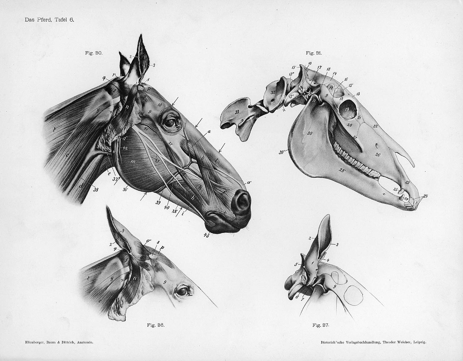 Animal anatomical engraving from Handbuch der Anatomie der Tiere für Künstler' - Hermann Dittrich, illustrator.